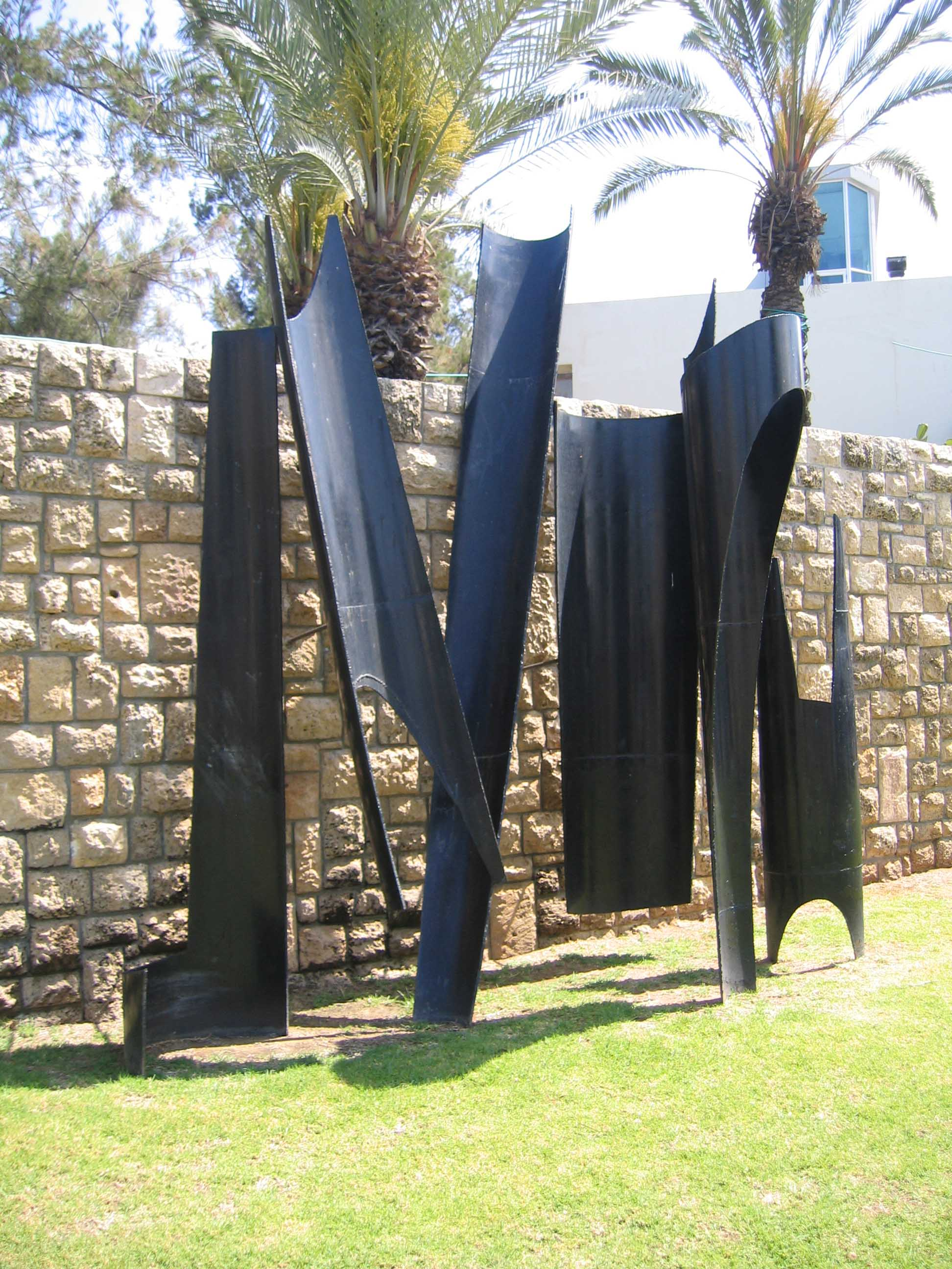 Sculpture